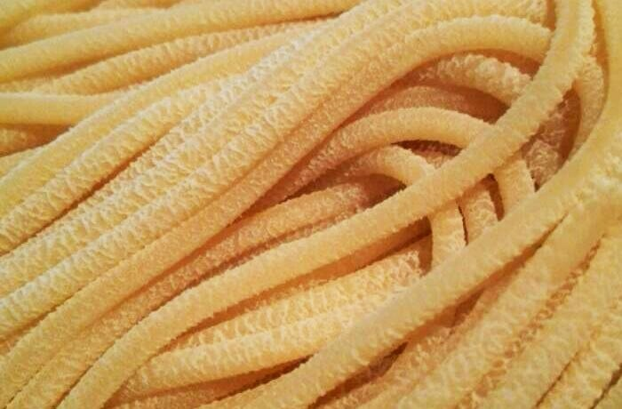 ブロンズダイスから押し出される際にできるザラザラのテクスチャが特徴。